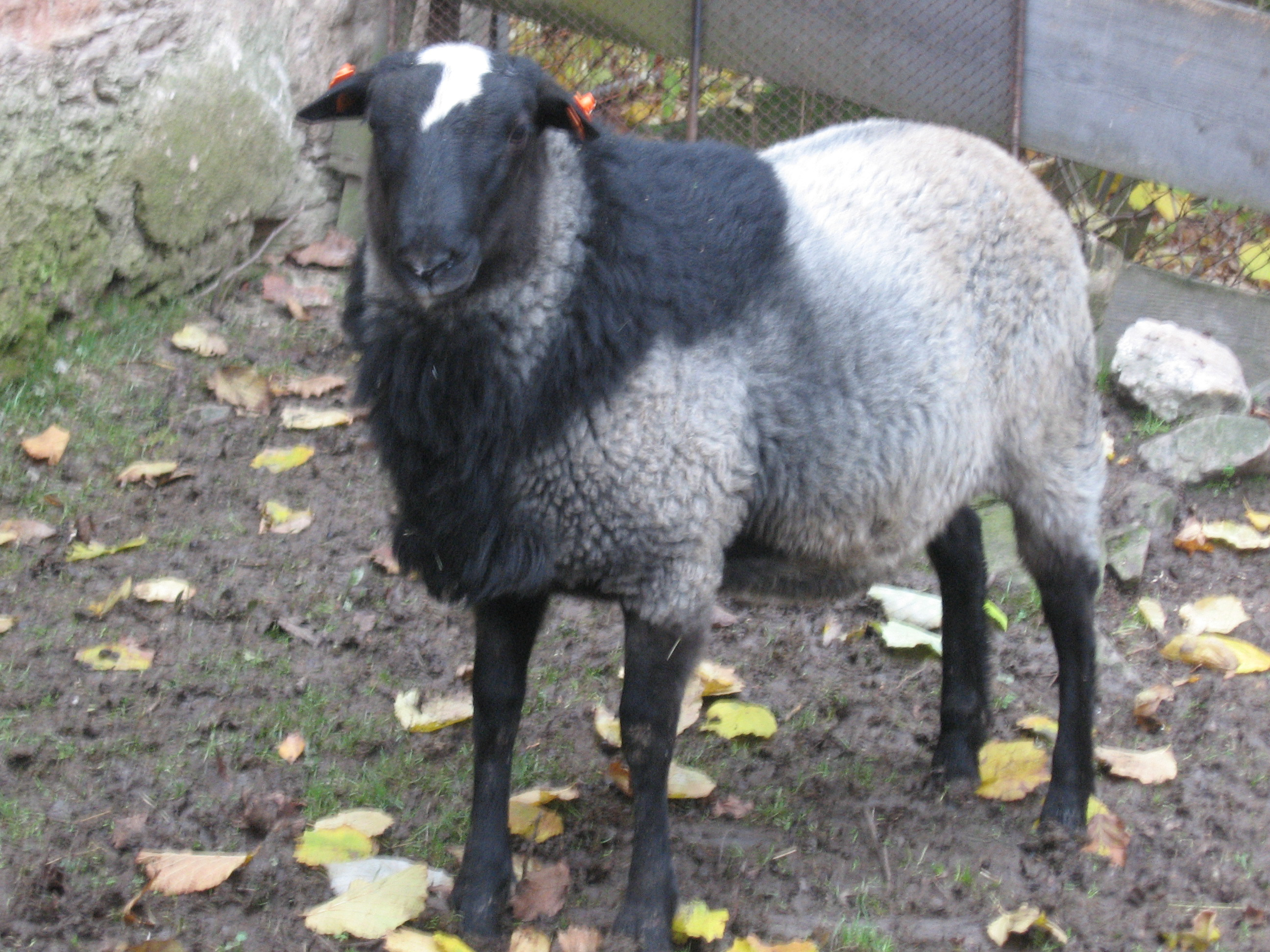 Romanovský beran, příslušník linie Rohan